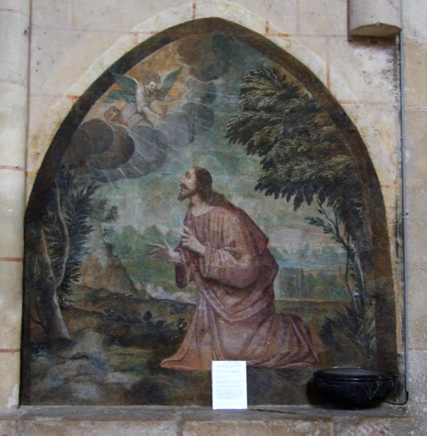 Cathédrale Saint-Pierre de Poitiers, Poitiers, Poitou-Charentes, FRANCE, peinture murale Christ au jardin des oliviers.